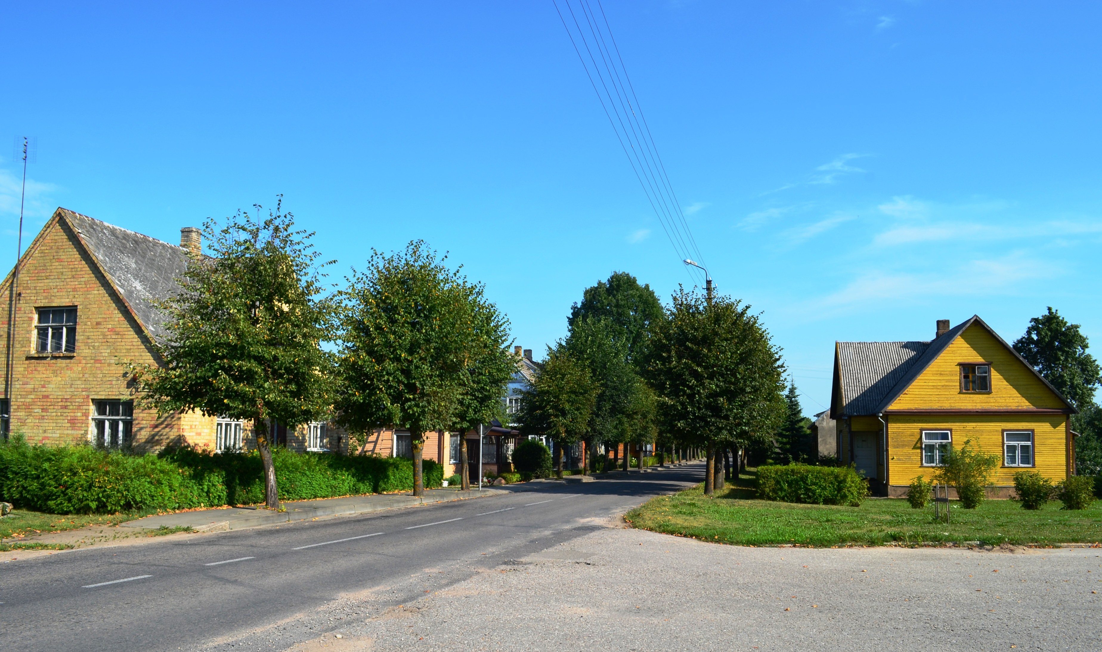 Biržų gatvė, Subačius, Kupiškio r.